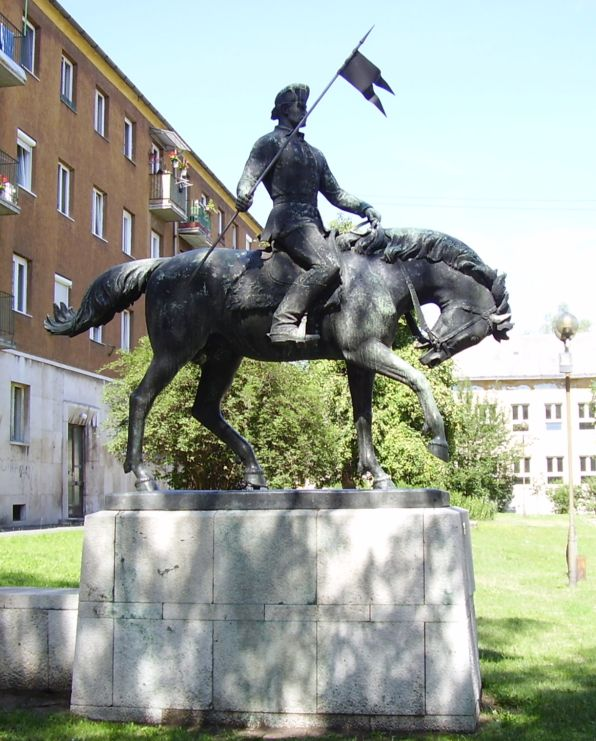 Búza Barna: Kuruc lovas (1956) (bronzszobor). Kazincbarcika, Rákóczi tér.